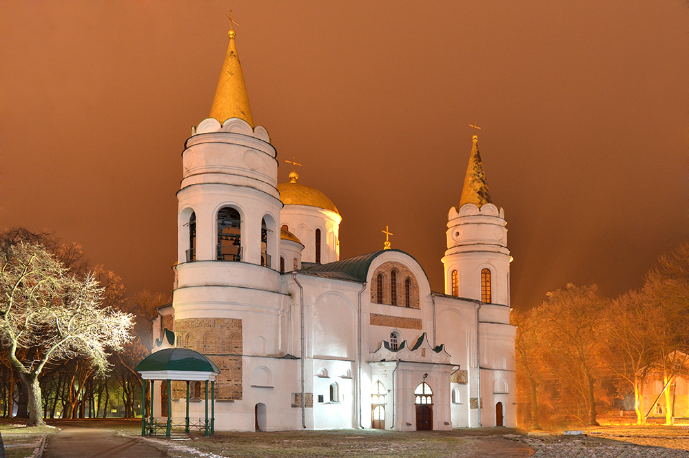 Спасо-Преображенский собор. Чернигов